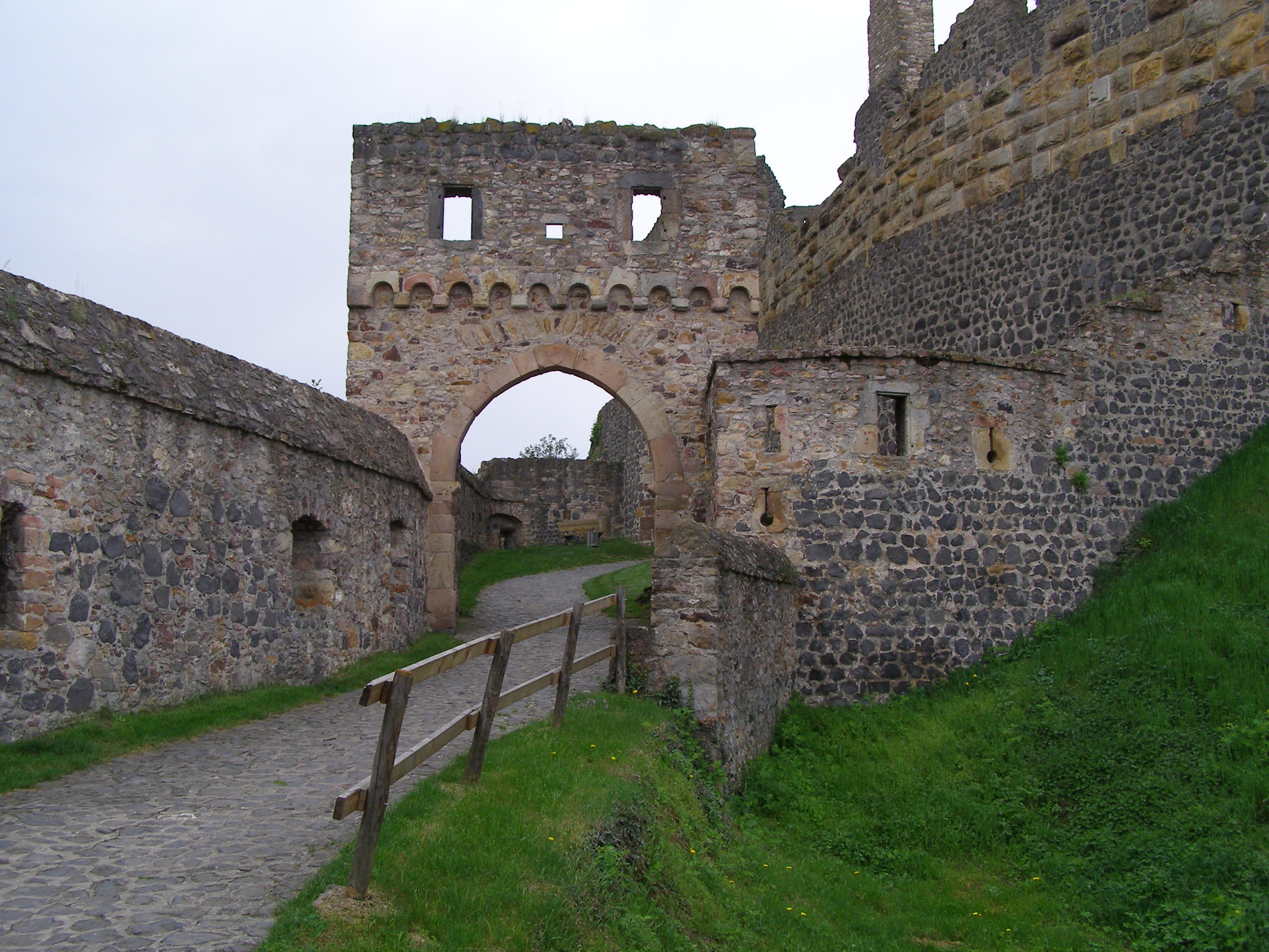 Burg Münzenberg